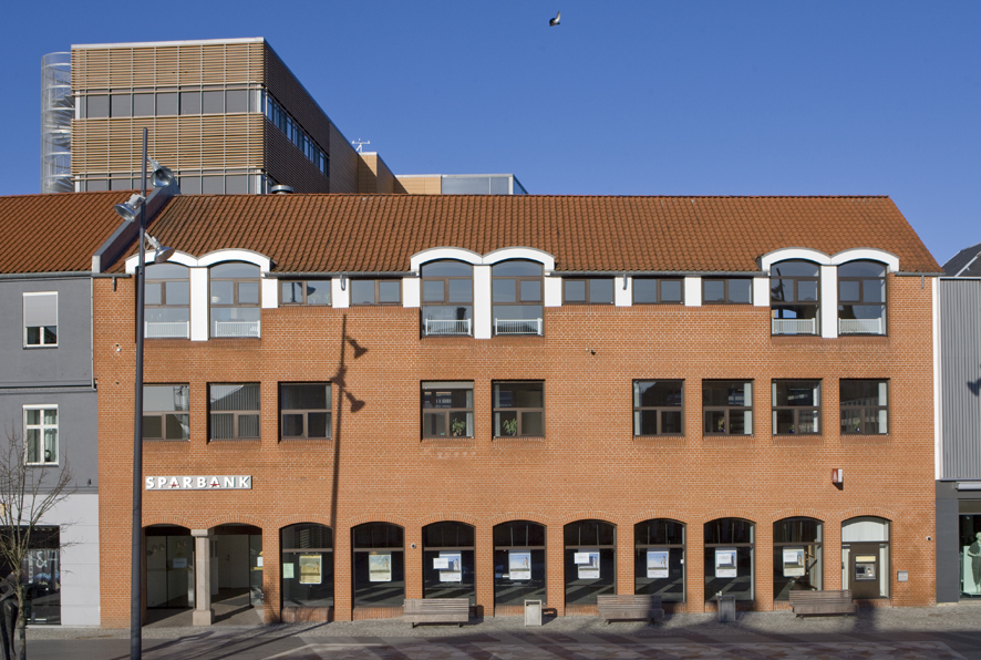 SPARBANKs hovedsæde i Skive